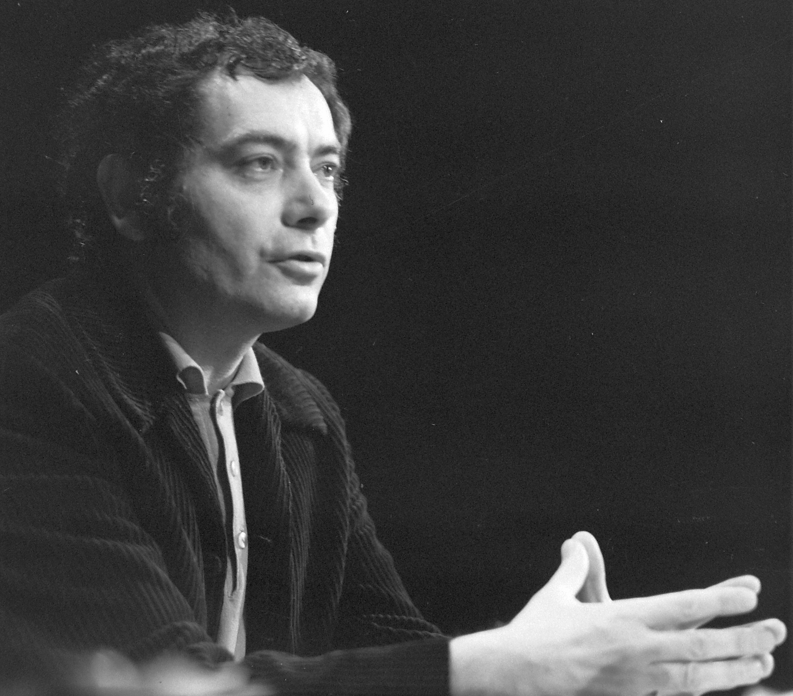 Csoóri Sándor író és költő. Location: Hungary Tags: celebrity Title: Csoóri Sándor író és költő.